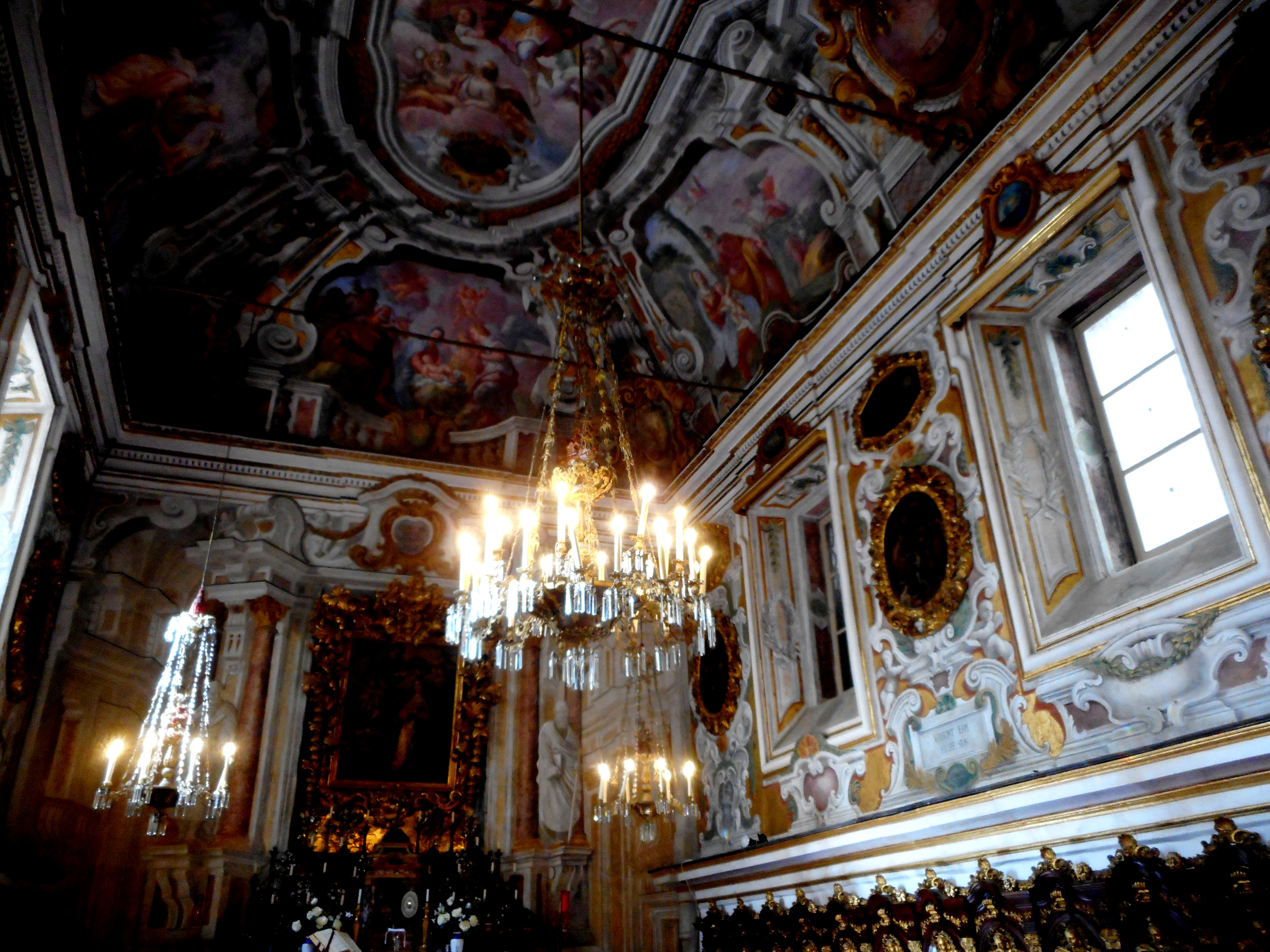 Interno dell'Oratorio delle Dame al Ponticello